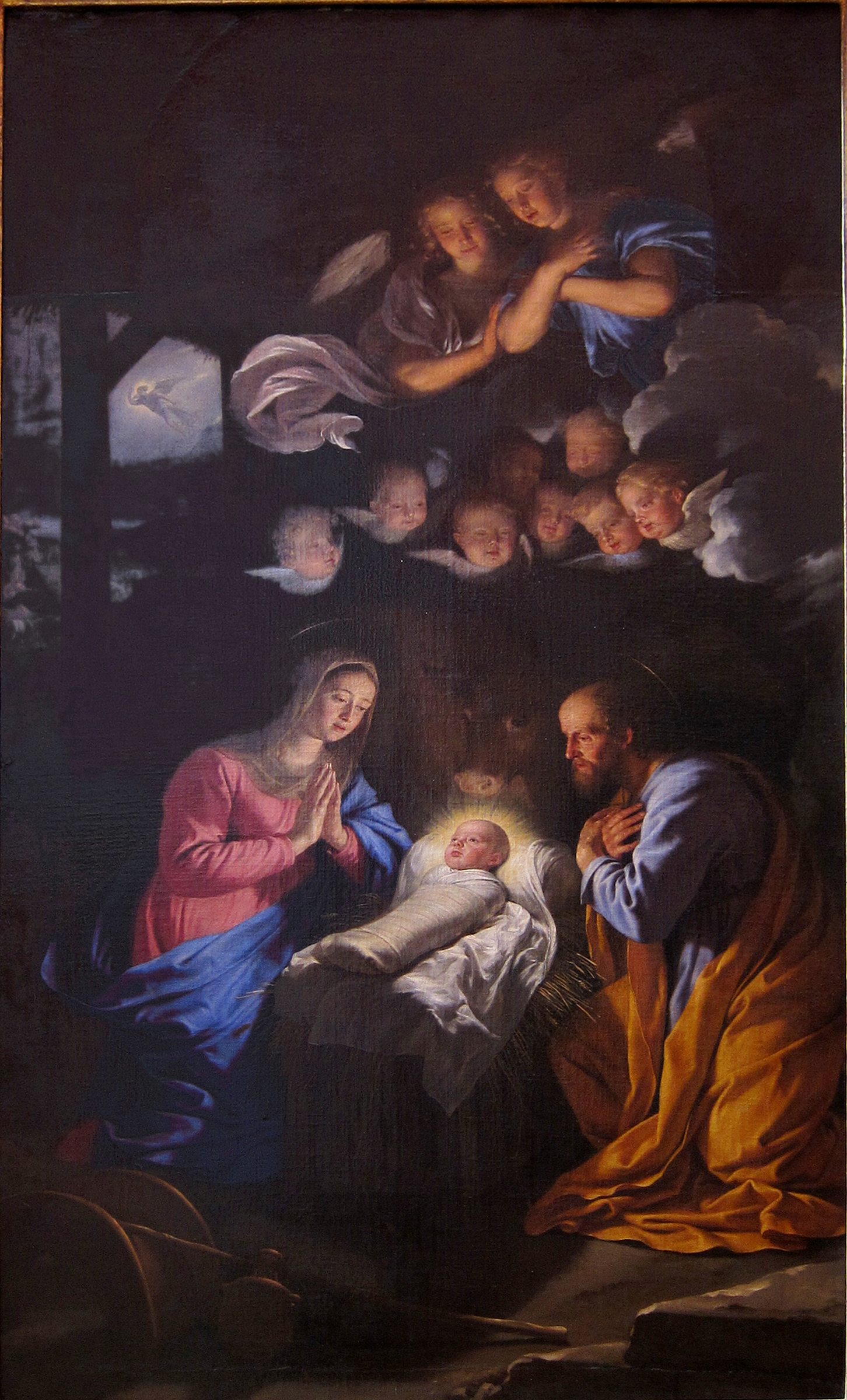 La nativité au Palais des Beaux-arts de Lille.